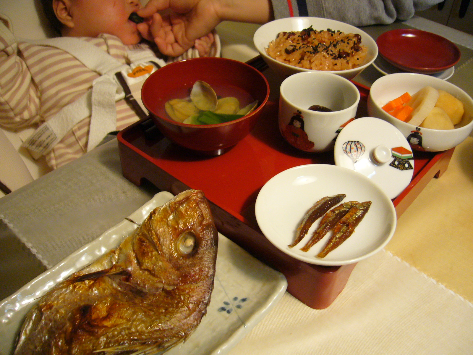 Beginning to eat,okuisome,katori-city,japan